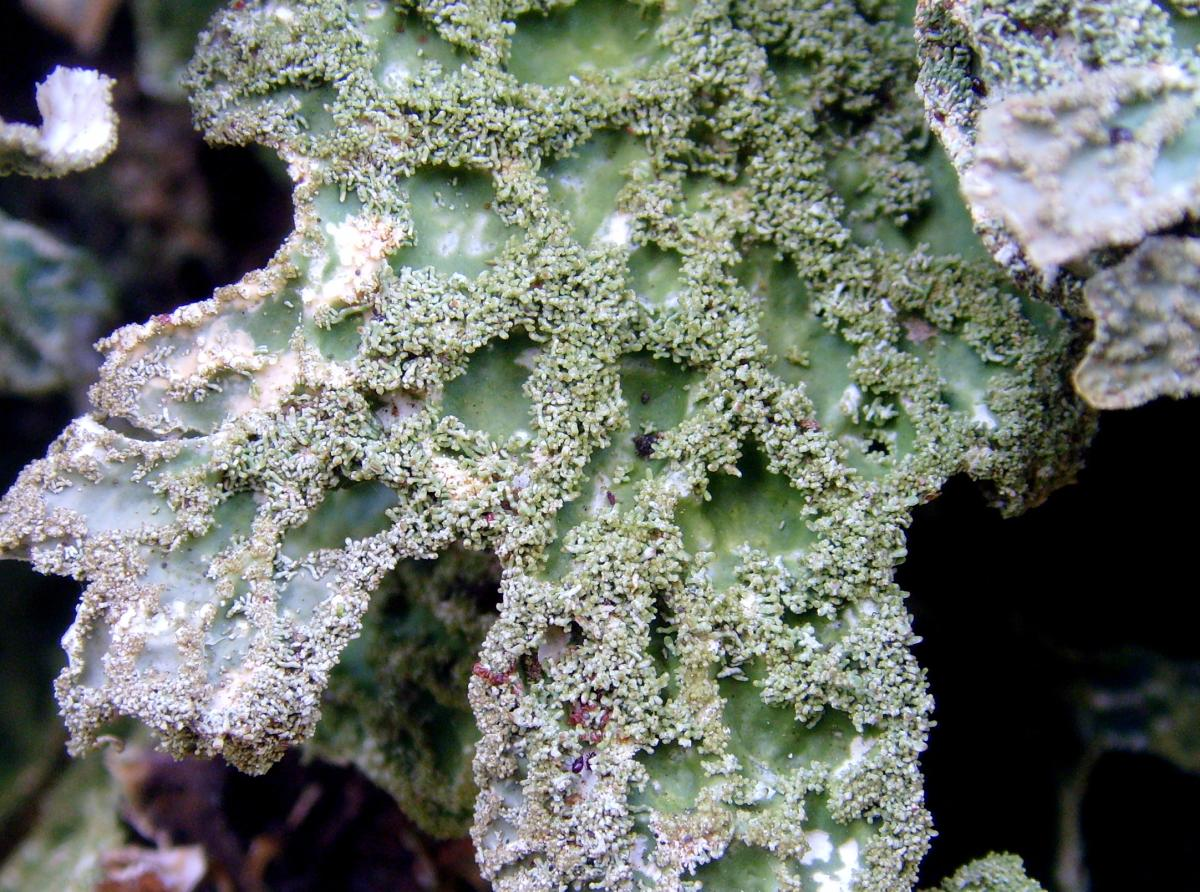 Lobaria pulmonaria, isidies, Pont Grayo (Berné, Morbihan, Bretagne, France)